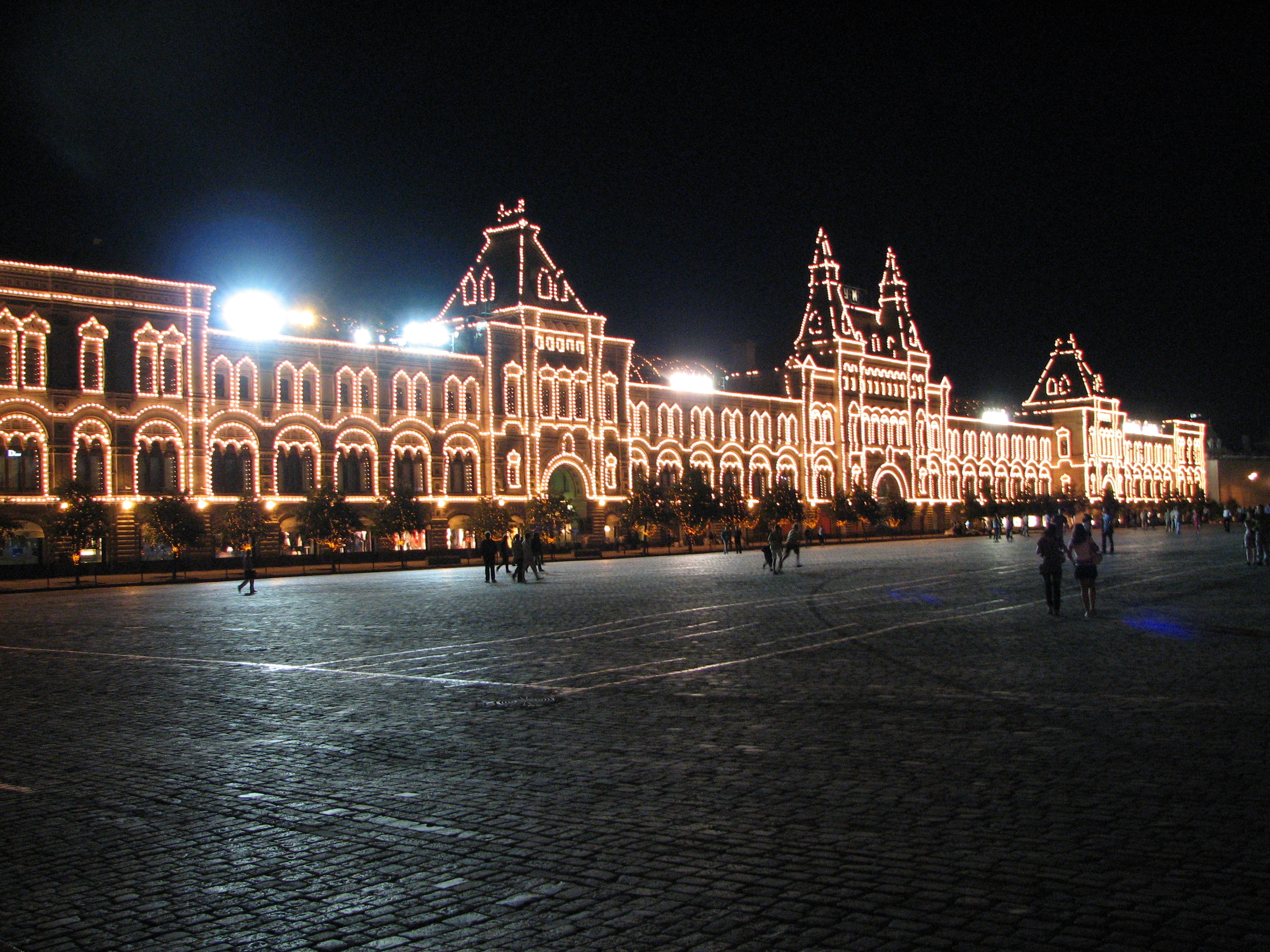 Goum, éclairage de nuit en été Gum by night in summer